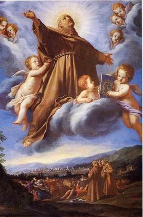 Villa del palco, Vincenzo Dandini, San Bernardino in gloria (1663 ca)